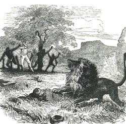 Приключение Ливингстона со львом. Илл. в статье Давид Ливингстон и его открытия в Южной Африке.